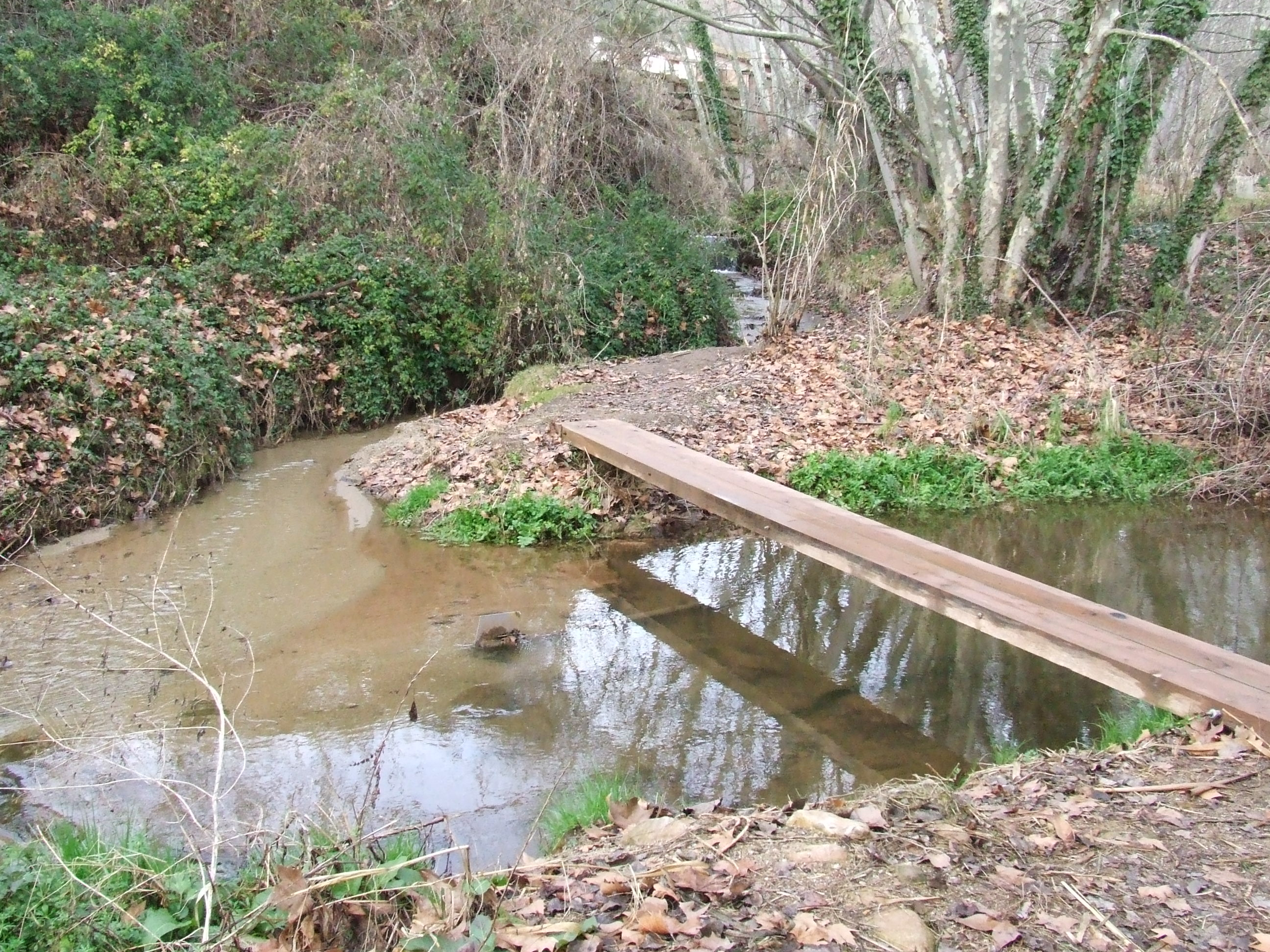 Aiguabarreig del torrent de la Torre i el Tenes (Bigues, Bigues i Riells, Vallès Oriental)